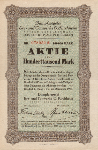 Aktie der des Ziegelherstellers "Dampfziegelei Erz- und Tonwerke O. Kirchheim AG" aus dem Jahr 1923